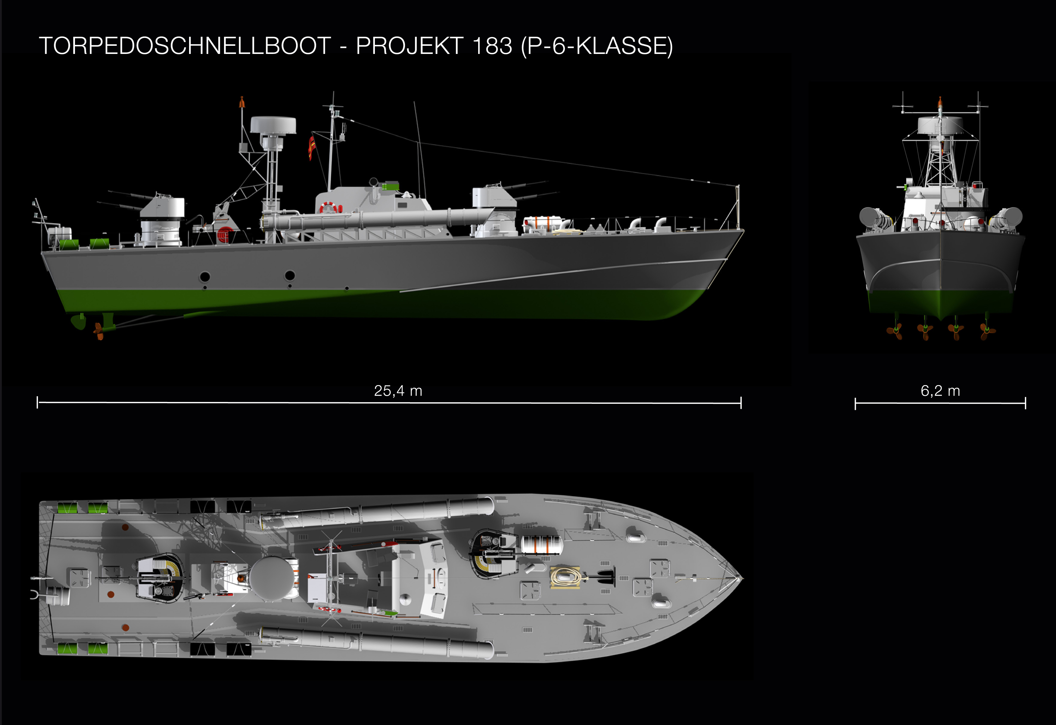 Typenblatt Torpedoschnellboot Projekt 183